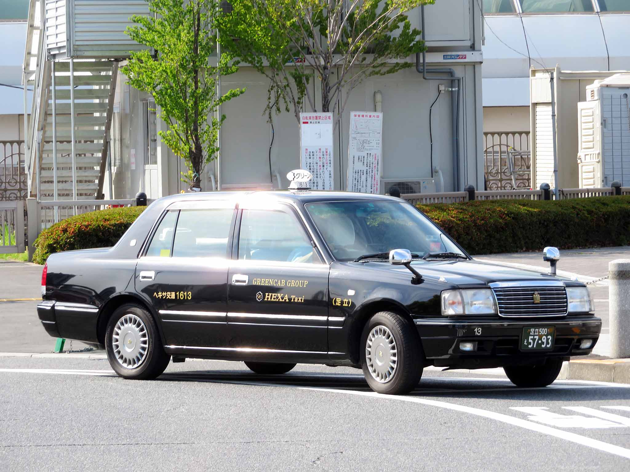 グリーンキャブに加盟するヘキサ交通の車両の例。 登録番号：足立500え5793 撮影地：東京都江東区、東京テレポート駅